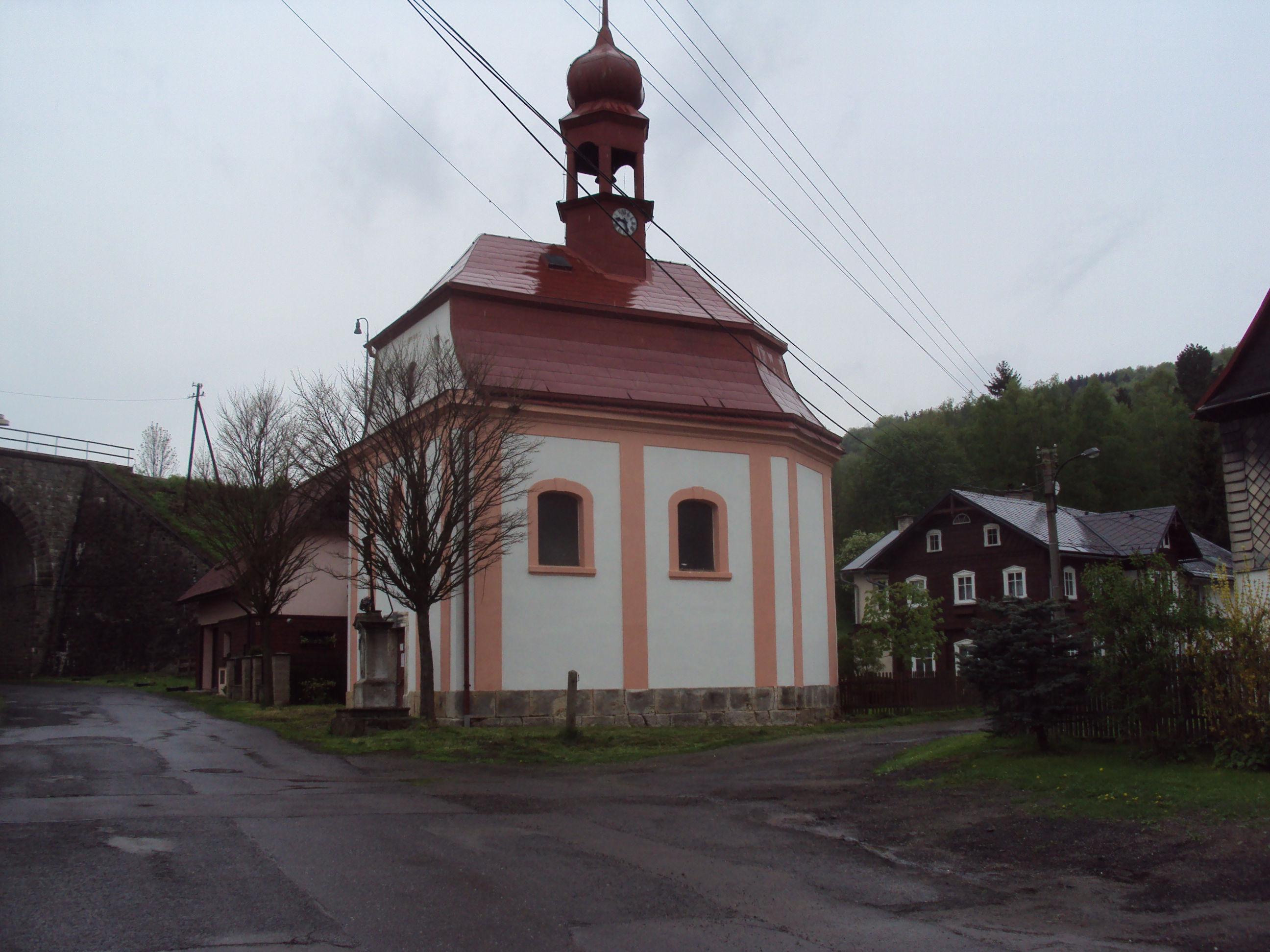 Kaple Nejsvětější Trojice ve Svoru (někdy označována jako barokní kostelík)